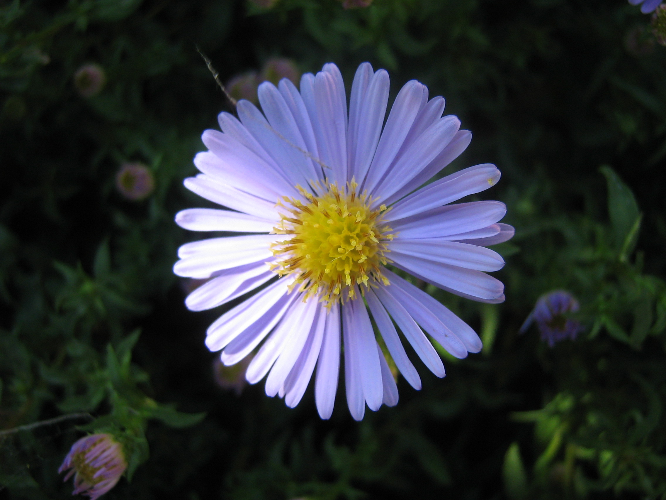 Kwiat Astra gawędki